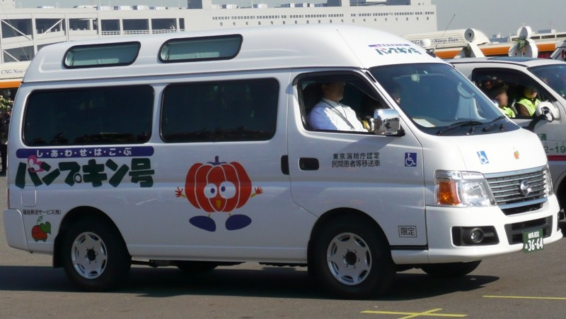 民間の患者搬送車。東京消防出初式にて撮影。